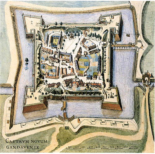 Spanjaardenkasteel, Gent, België SANDERUS A, Flandria Illustrata, 1641, p. 148.